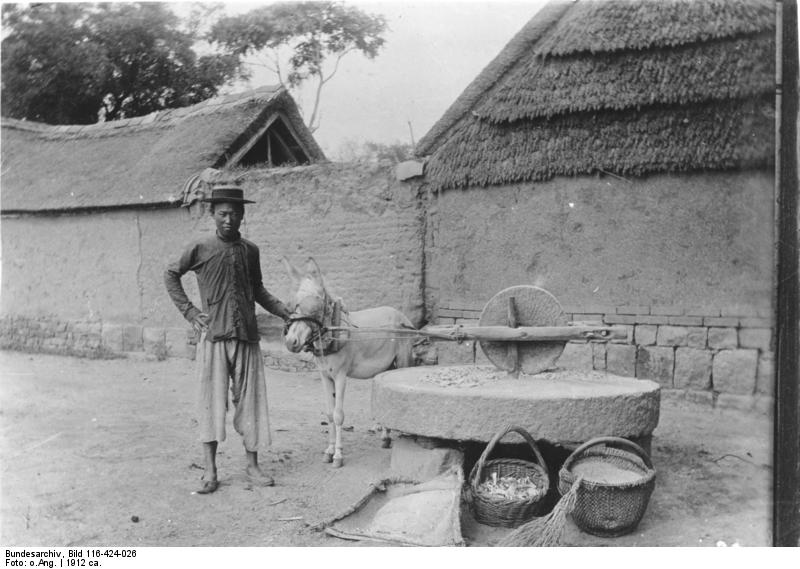 China, Tsingtau China, Tsingtau um 1912 [China, Tsingtau.- Einheimischer mit Esel an einem Mühlstein Fotoalbum: Bilder aus China, von Ob.Matr.Artl. Quinten; Bem.: Originaltitel z.T. inkorrekt